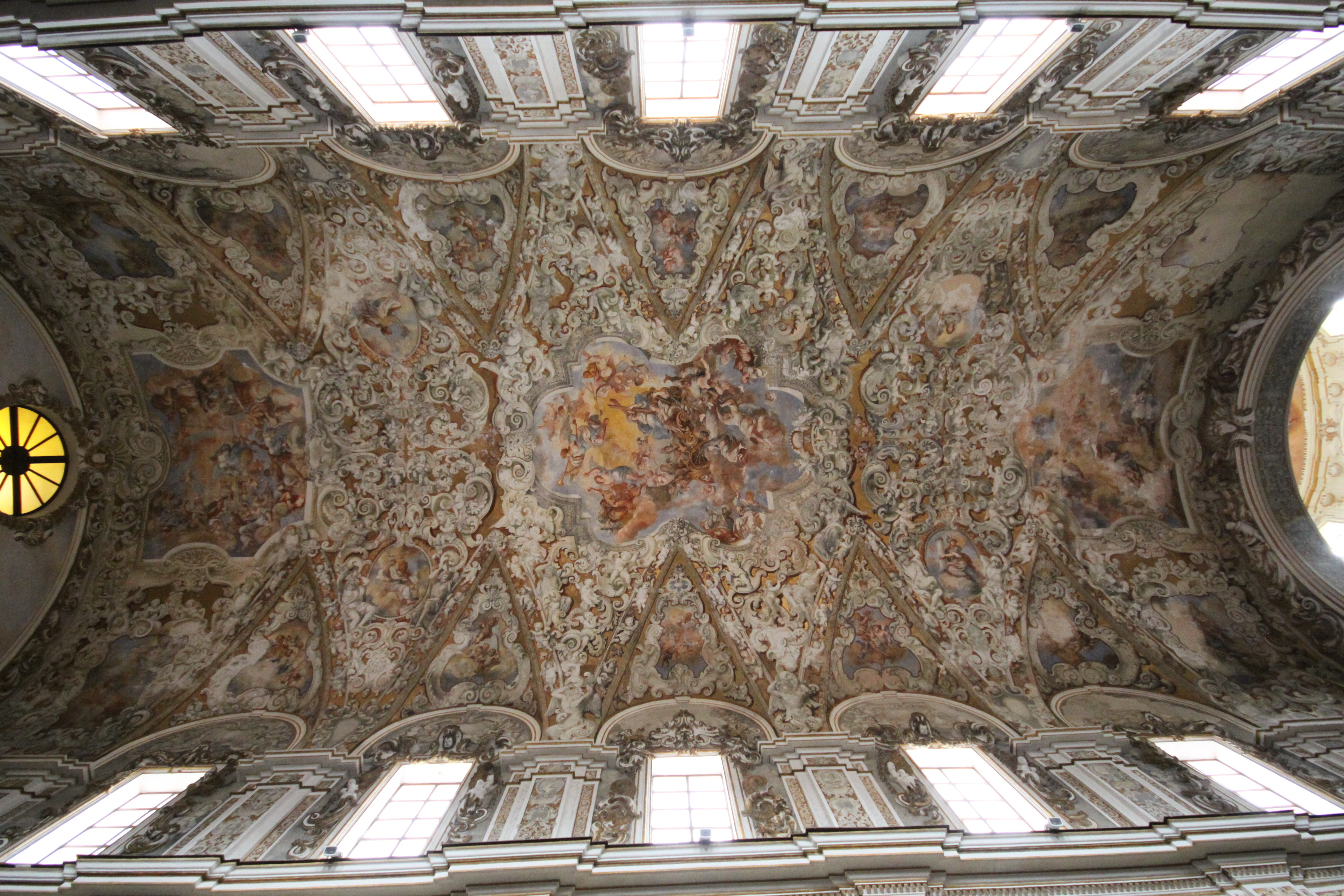 Cathedral (Mazara del Vallo), interior